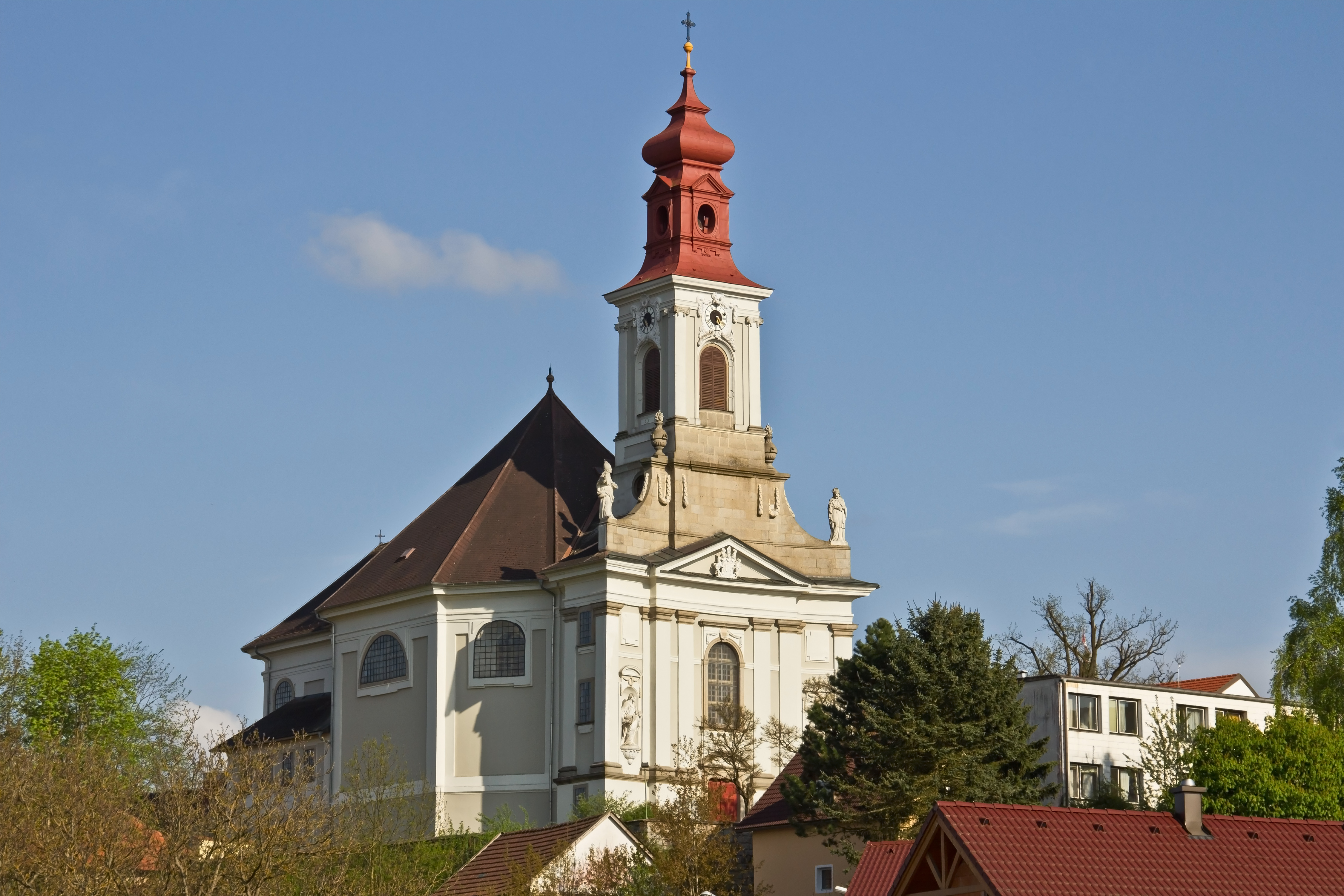 Das spätbarock-frühklassizistische Kirchengebäude wurde von 1776 bis 1778 durch den Baumeister Andreas Zach errichtet. Es besitzt eine klassizistische Ausstattung.